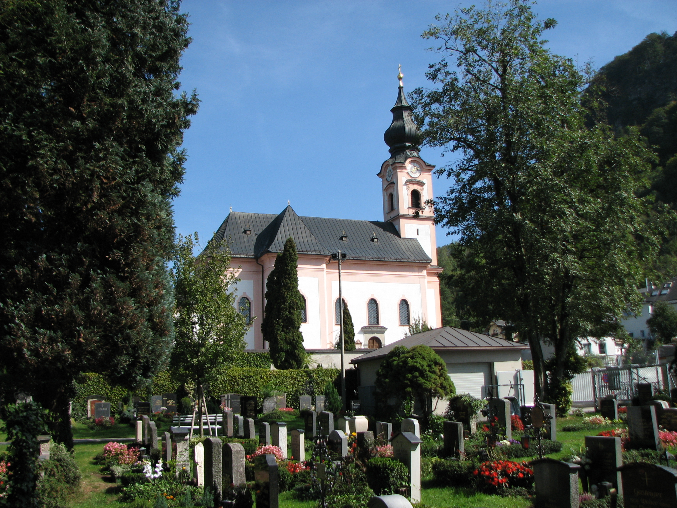 Kath. Pfarrkirche Gnigl, hl. Michael mit Friedhof